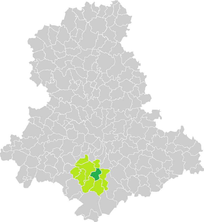 Carte de situation de la commune de Janailhac (en vert foncé) dans le votre Canton (en vert clair) sur une carte des communes de la Haute-Vienne